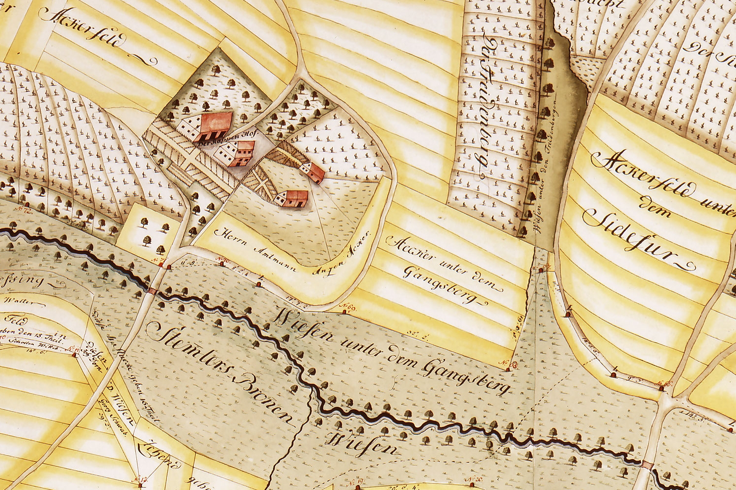 Hauptplan über den zwischen Württemberg, Löwenstein und Comburg gemeinschaftlichen Wiesenzehnt zu Weinsberg. Mit einer Ansicht des Rappenhofs.